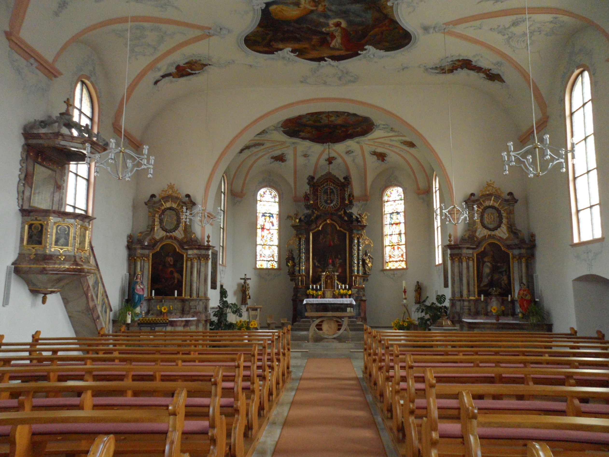 Katholische Kirche St. Vitus von 1755 in Fützen bei Blumberg